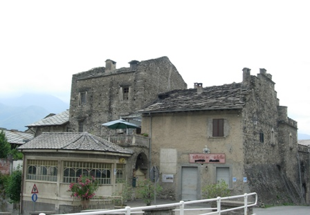 Il Castello di Chianocco vista da Nord-Est